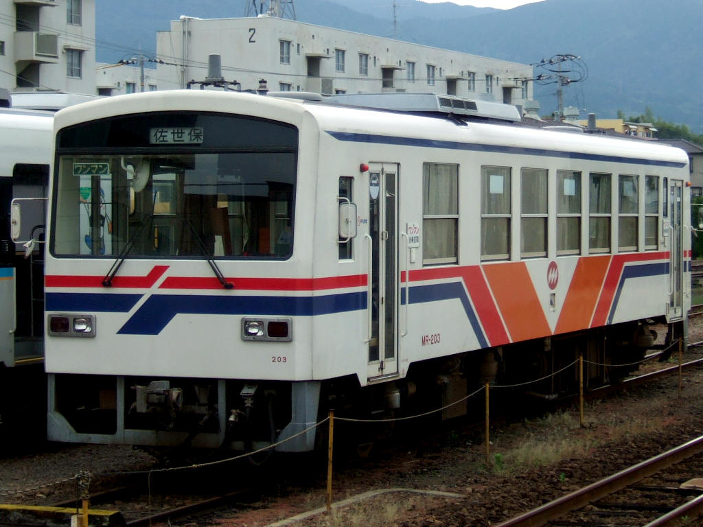 松浦鉄道MR-200形（伊万里駅構内にて）